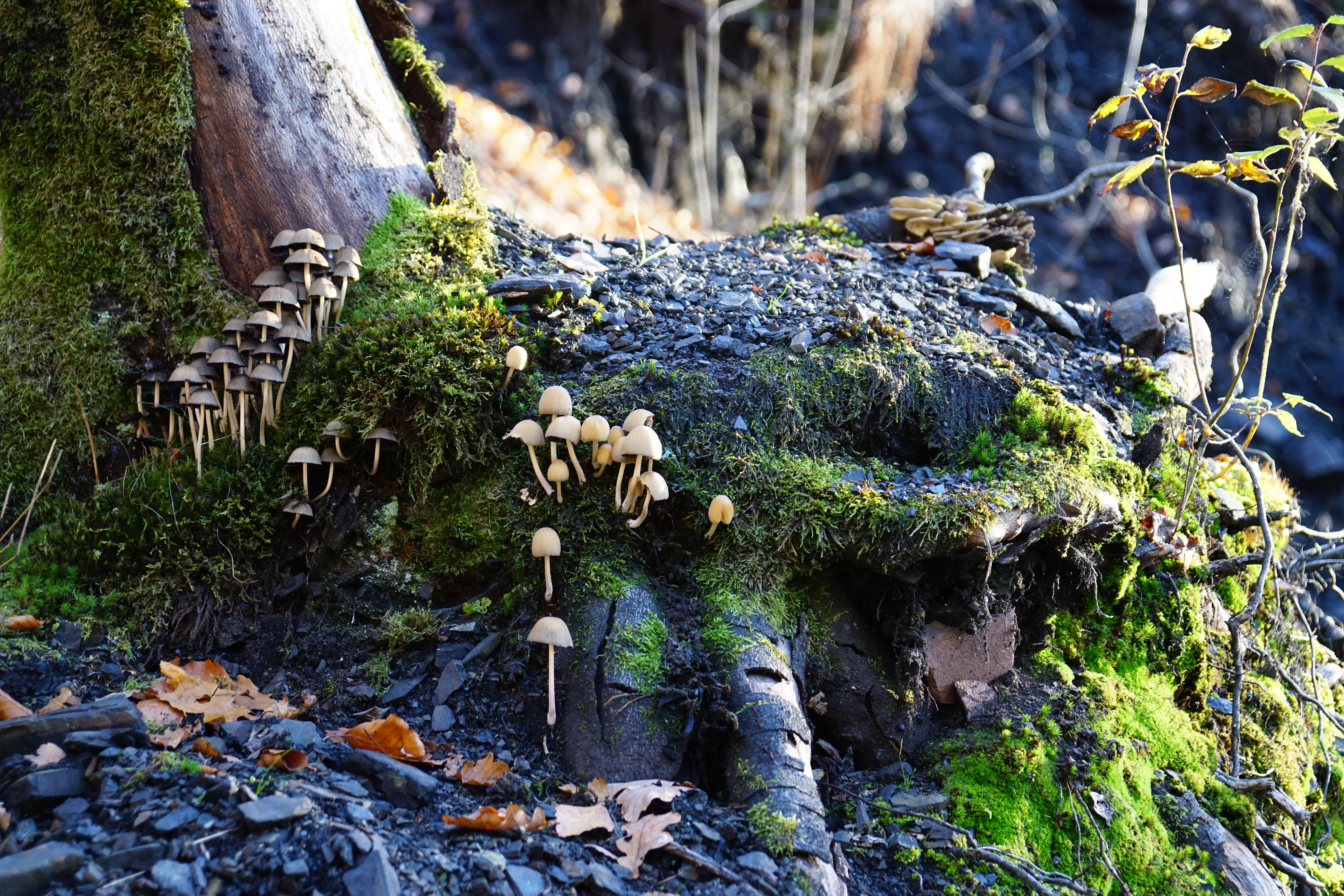 Coprinellus sur le terril du puits Sainte-Pauline à Champagney (70).